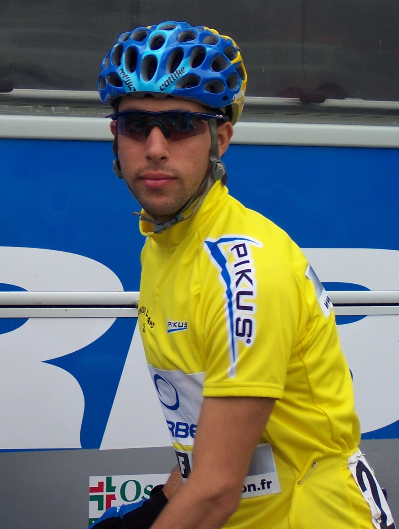 Jonathan Castroviejo, cycliste de l'équipe Orbea, lors de la première étape de la Ronde de l'Isard 2009. La photo a été prise quelques minutes avant le départ, à Saint-Girons (Ariège, France).